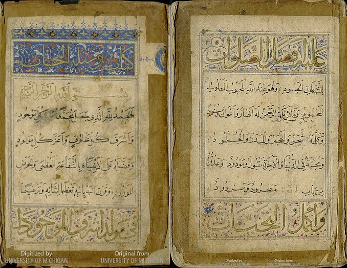 Páginas del libro manuscrito iluminado del masnavi "Wasīlat al-najāt fī mawlid Ashraf al-mawjūdāt" de Süleyman Çelebi de Bursa (m.ca. 1429). En él se narra el nacimiento y hechos milagrosos del Profeta Muhammad.